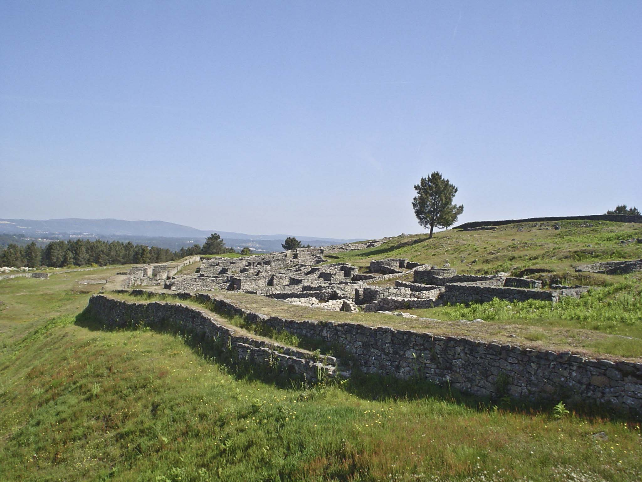 Barrio oeste visto desde a segunda muralla exterio do lado sur do Castro de San Cibrao de Las